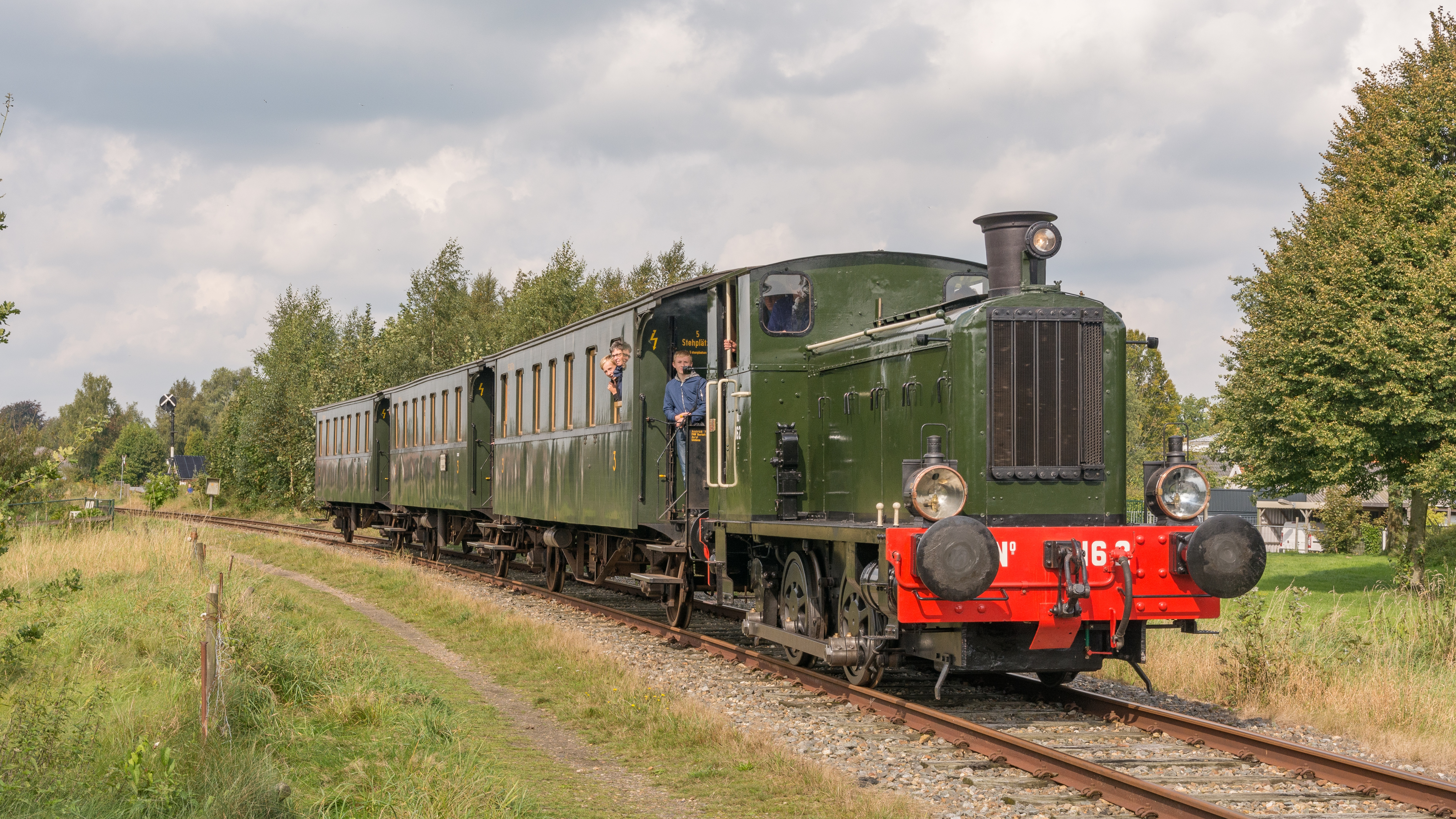 Pruttelend komt diesellocomotief 162 (ex-NS) met passagierstrein 3756 vanaf het station van Stadskanaal door de eerste bocht op weg naar Musselkanaal